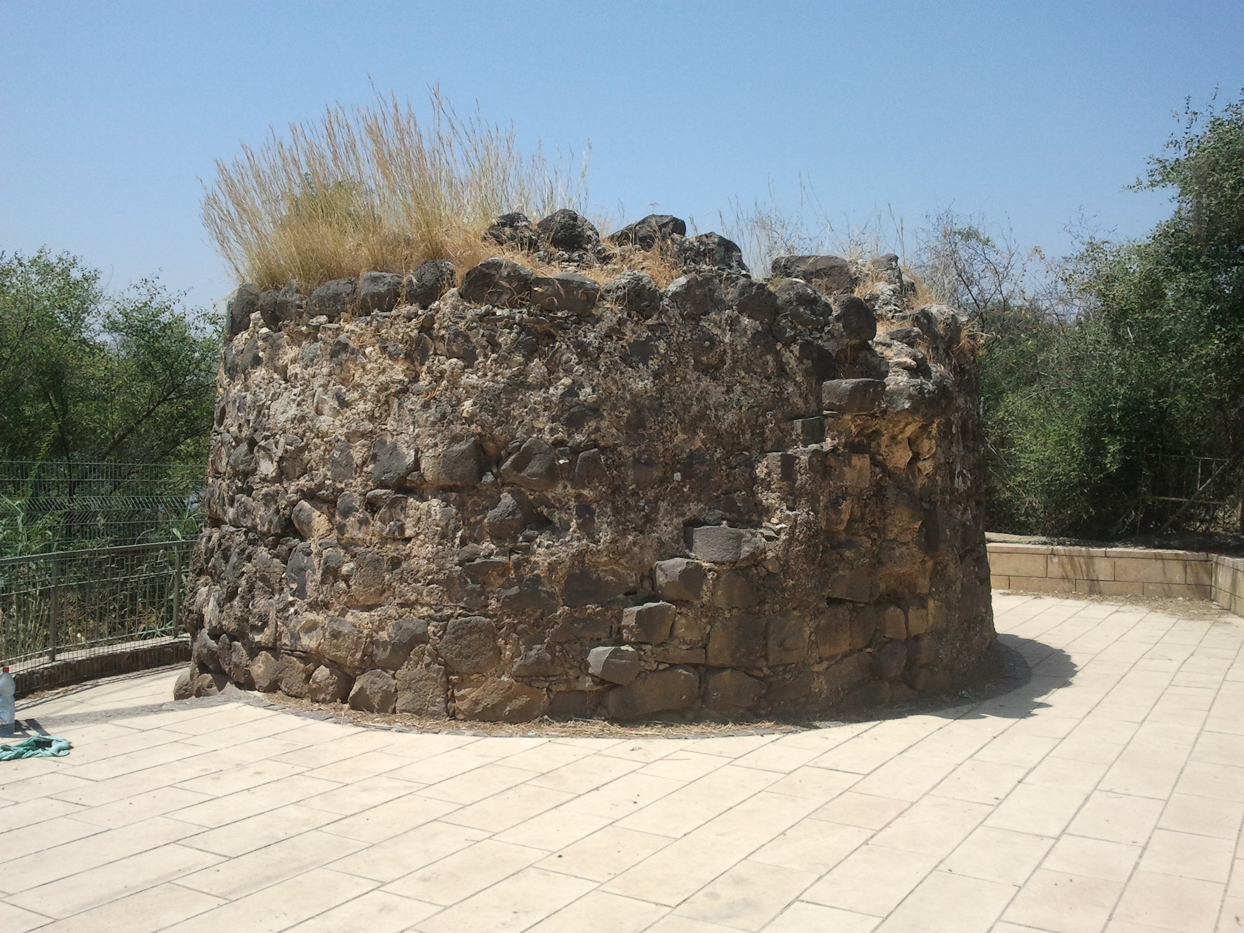 Ein Eyov, Spring near Capernaum Israel עין איוב, מעיין ומפל ליד הכנרת, ליד הגן הלאומי כפר נחום בריכת הרמה עתיקה מהתקופה הרומאית-ביזנטית.